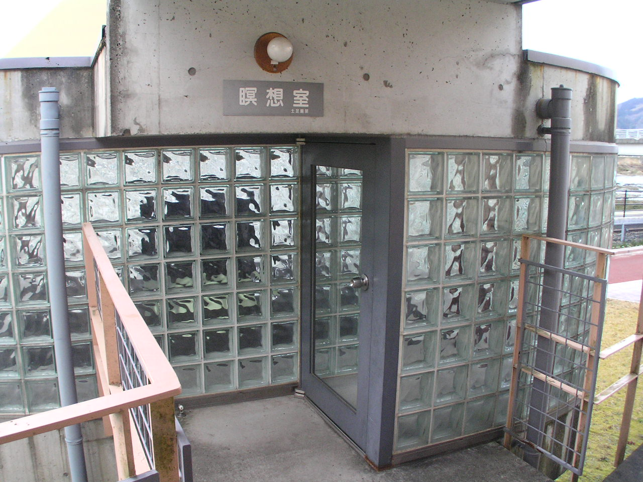 Okanoyama museum3 ～photo by Autumn Snake 【おぉたむ すねィく探検隊】写真部門 担当 大原佳苗